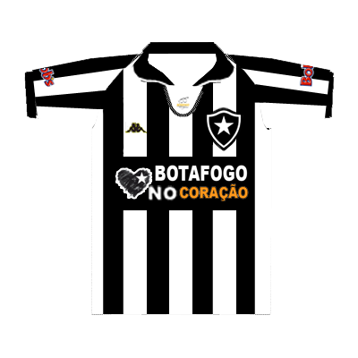 Uniforme do Botafogo 2004